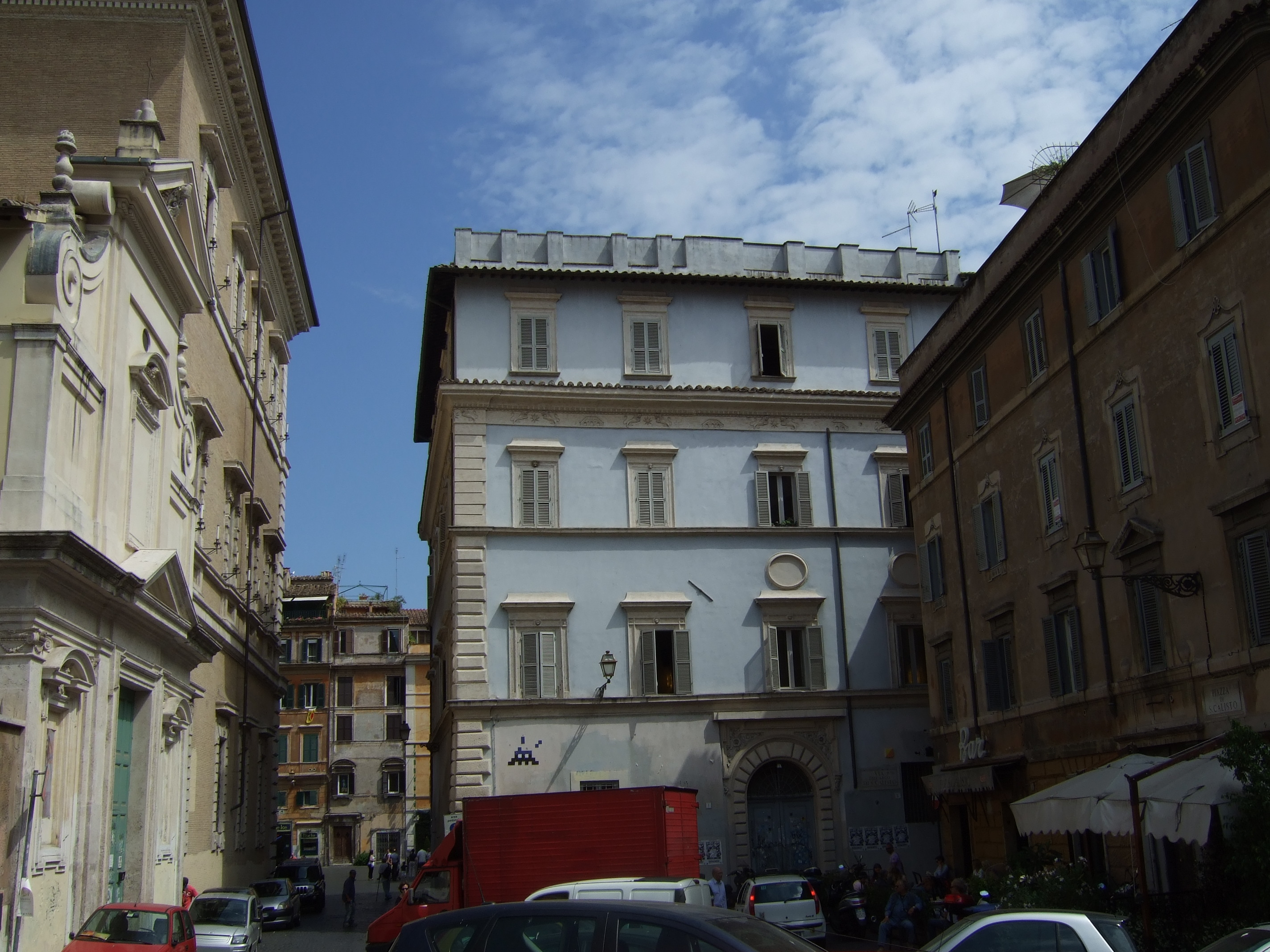 Piazza di San Calisto graffiti